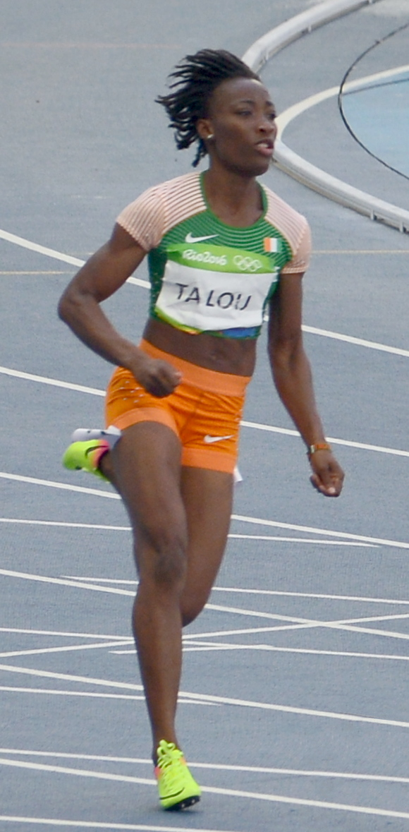 4ème Série du 200m féminin de Rio 2016